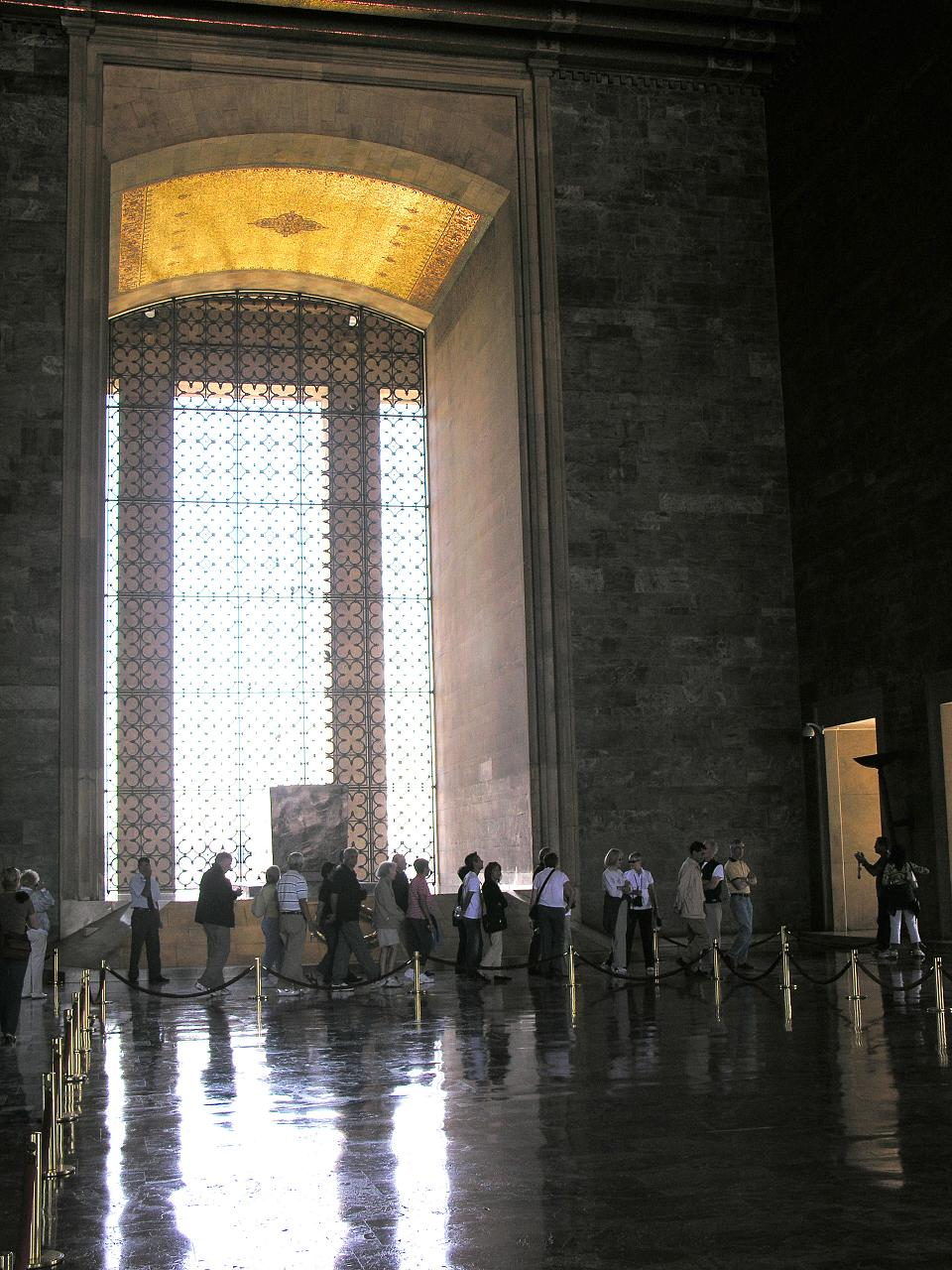 Turkey-1661